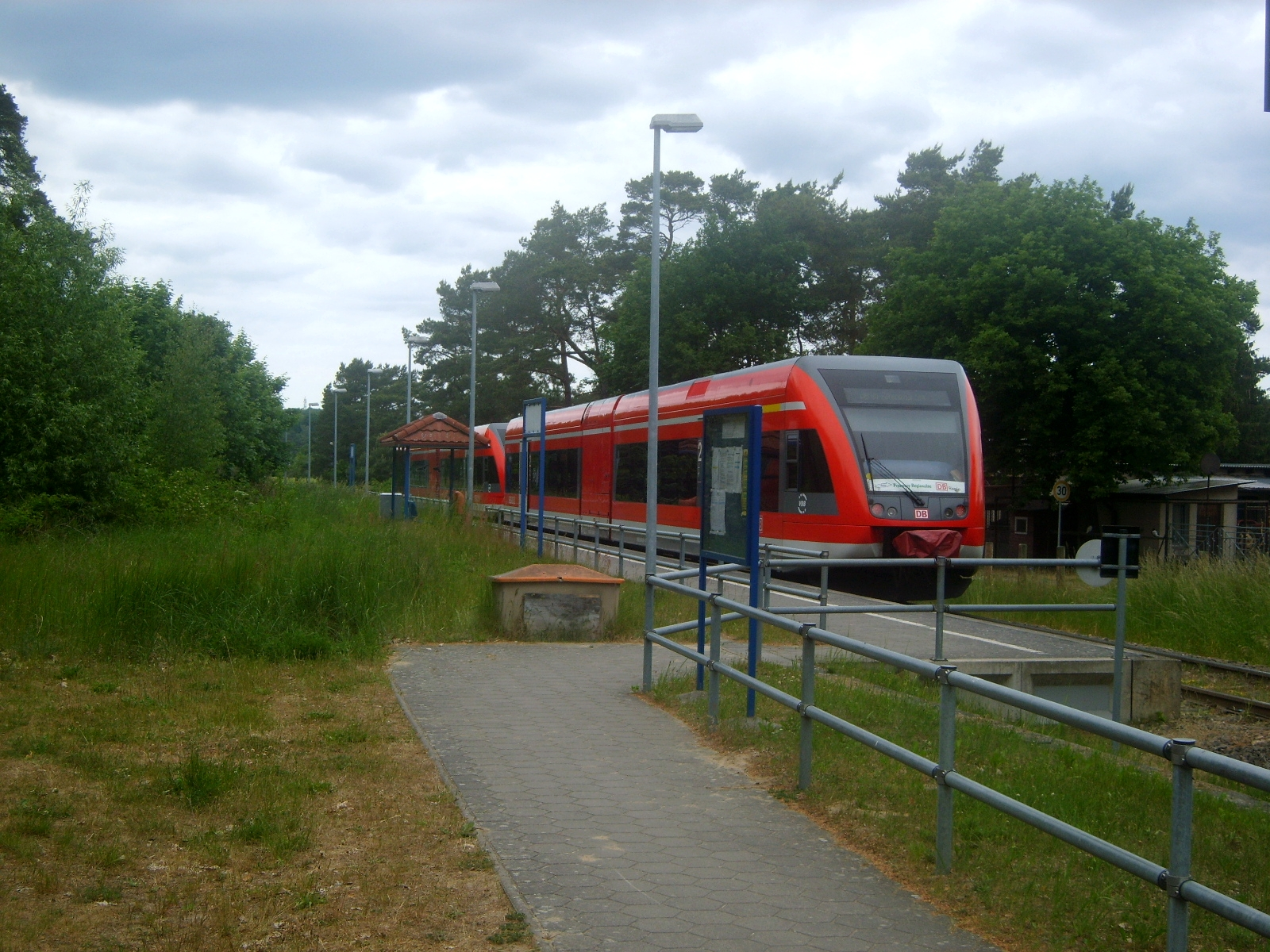 Pociąg DB do stacji Berlin Zoologischer Garten na przystanku Stubbenfelde.